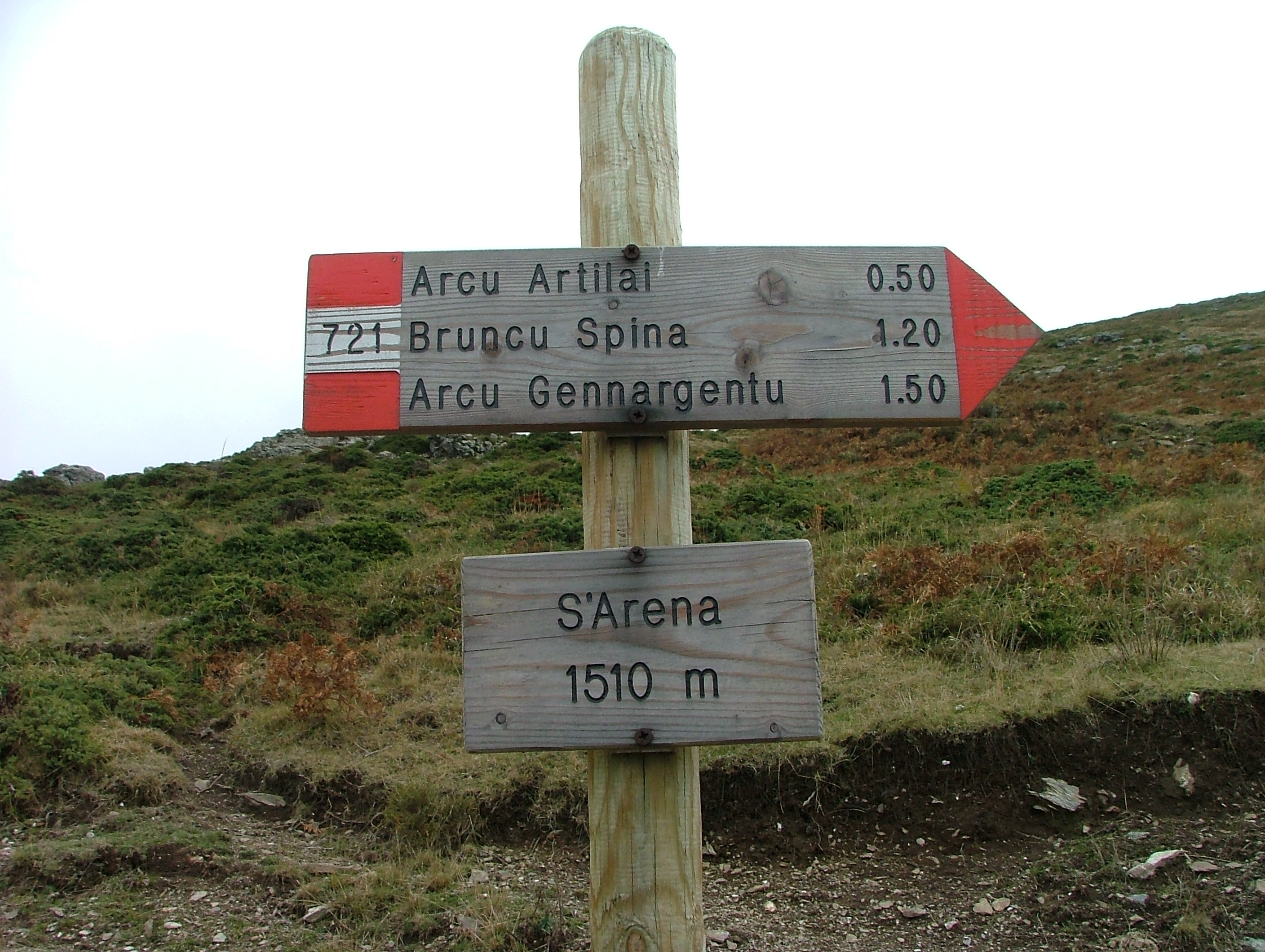 Cartello indicatore lungo il sentiero Gennargentu T-721 - località S'Arena, Desulo